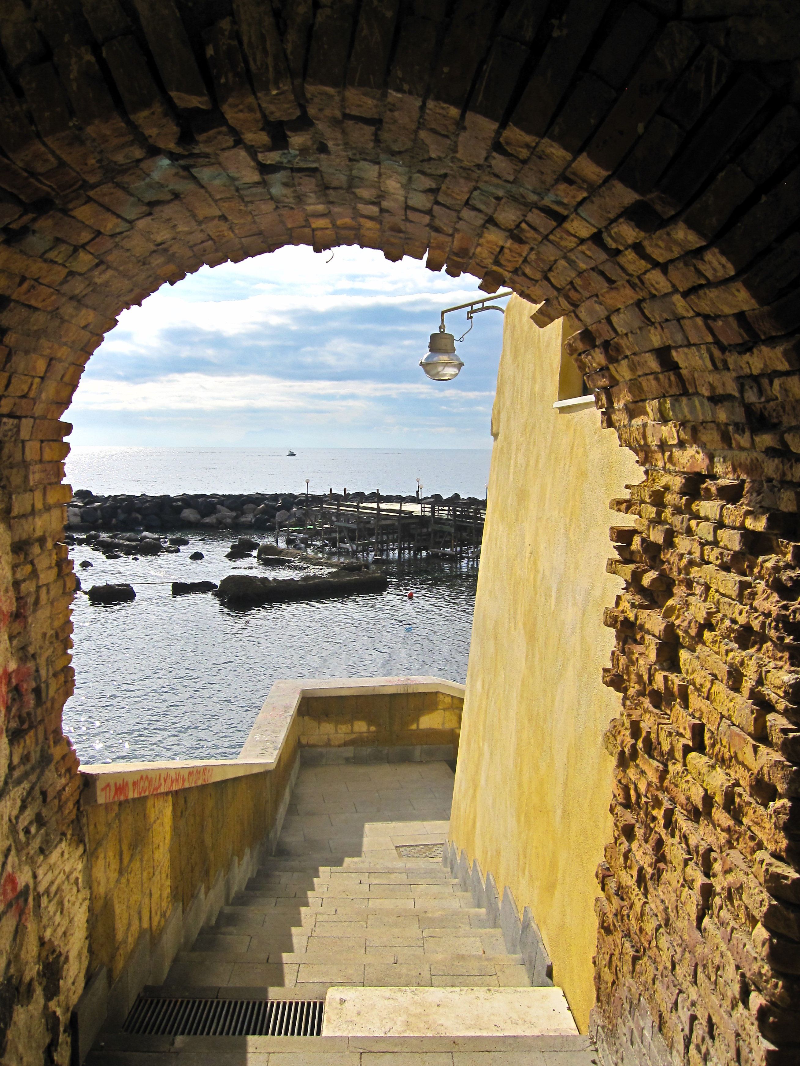 Le scalette di Marechiaro (Napoli)